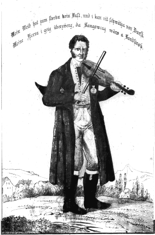 David Pfeffer, handcolorierte Lithographie um 1850 im Besitz von Luise Schlegel, Alt-Ochsenwirtin